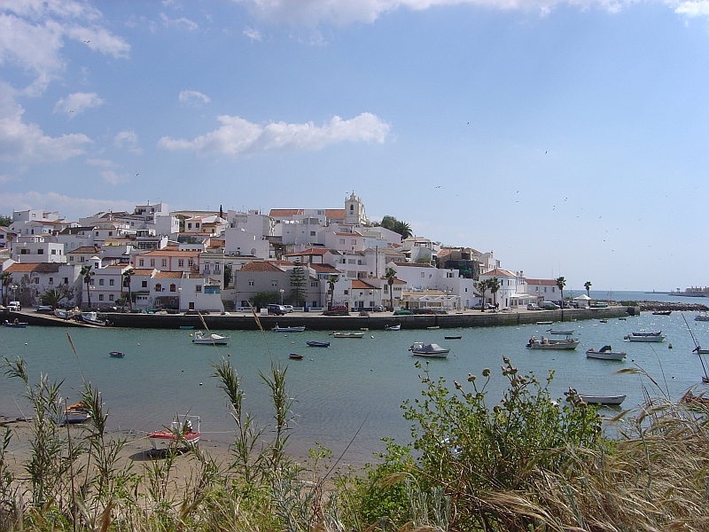 Ferragudo, Lagoa, Algarve, Portugal